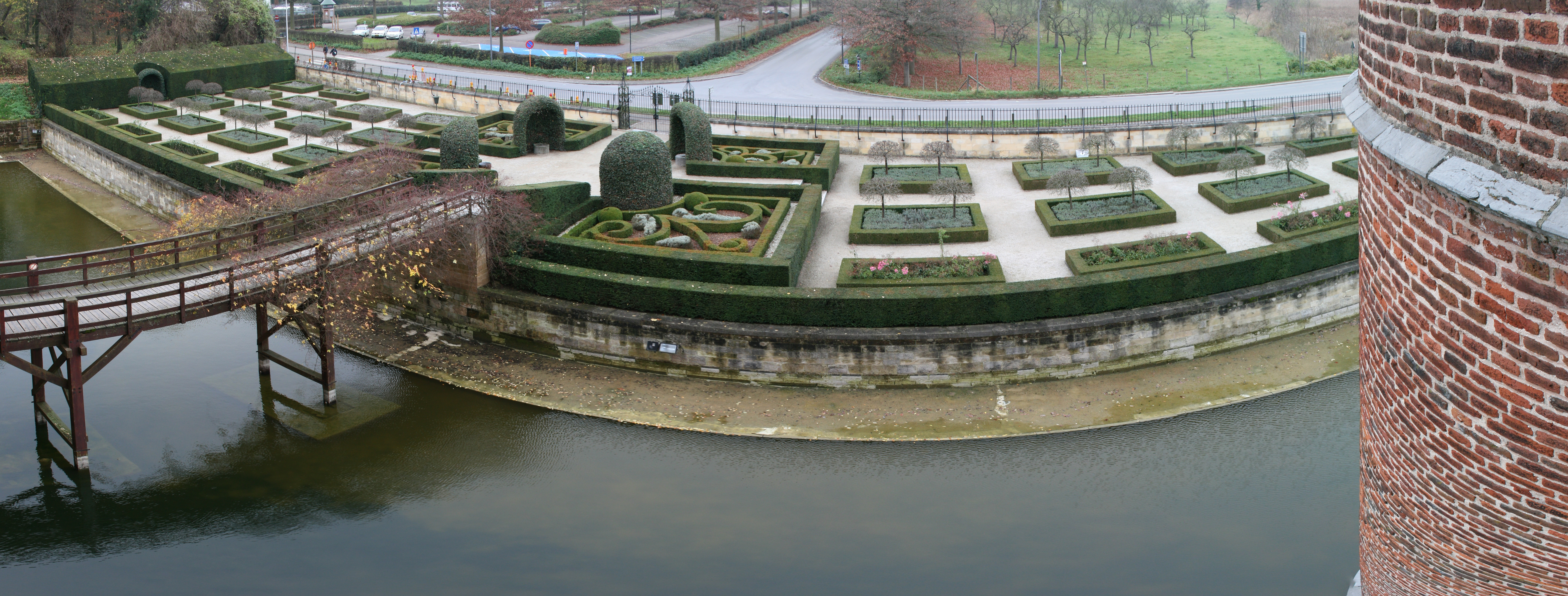 Das Bild zeigt die westlich des Schlosses Alden Biesen gelegene, französische Gartenanlage; im Hintergrund die Besucherparkplätze sowie die Straßenkreuzung Kasteelstraat (links), Roelants du Vivierlaan (mitte) und Reekstraat (rechts), aufgenommen aus dem Konferenzraum "Bocholtz".